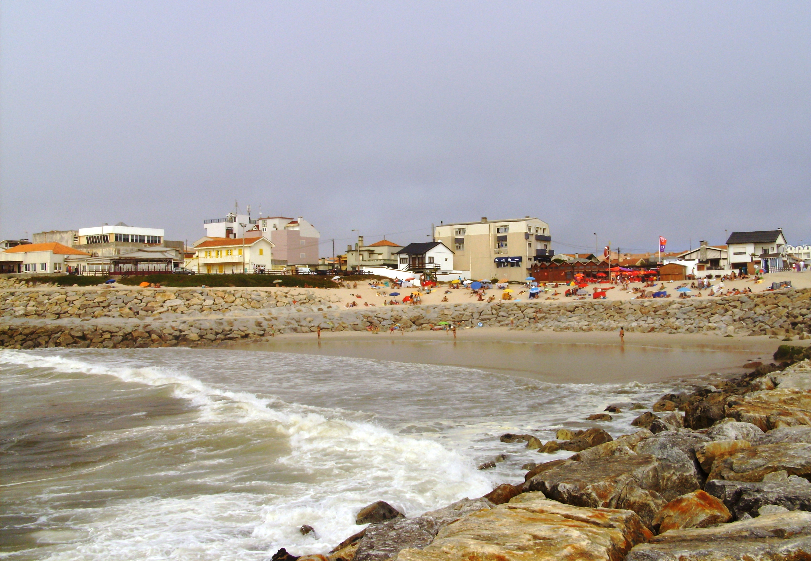 Praia de Cortegaça, Ovar, distrito de Aveiro, Portugal.